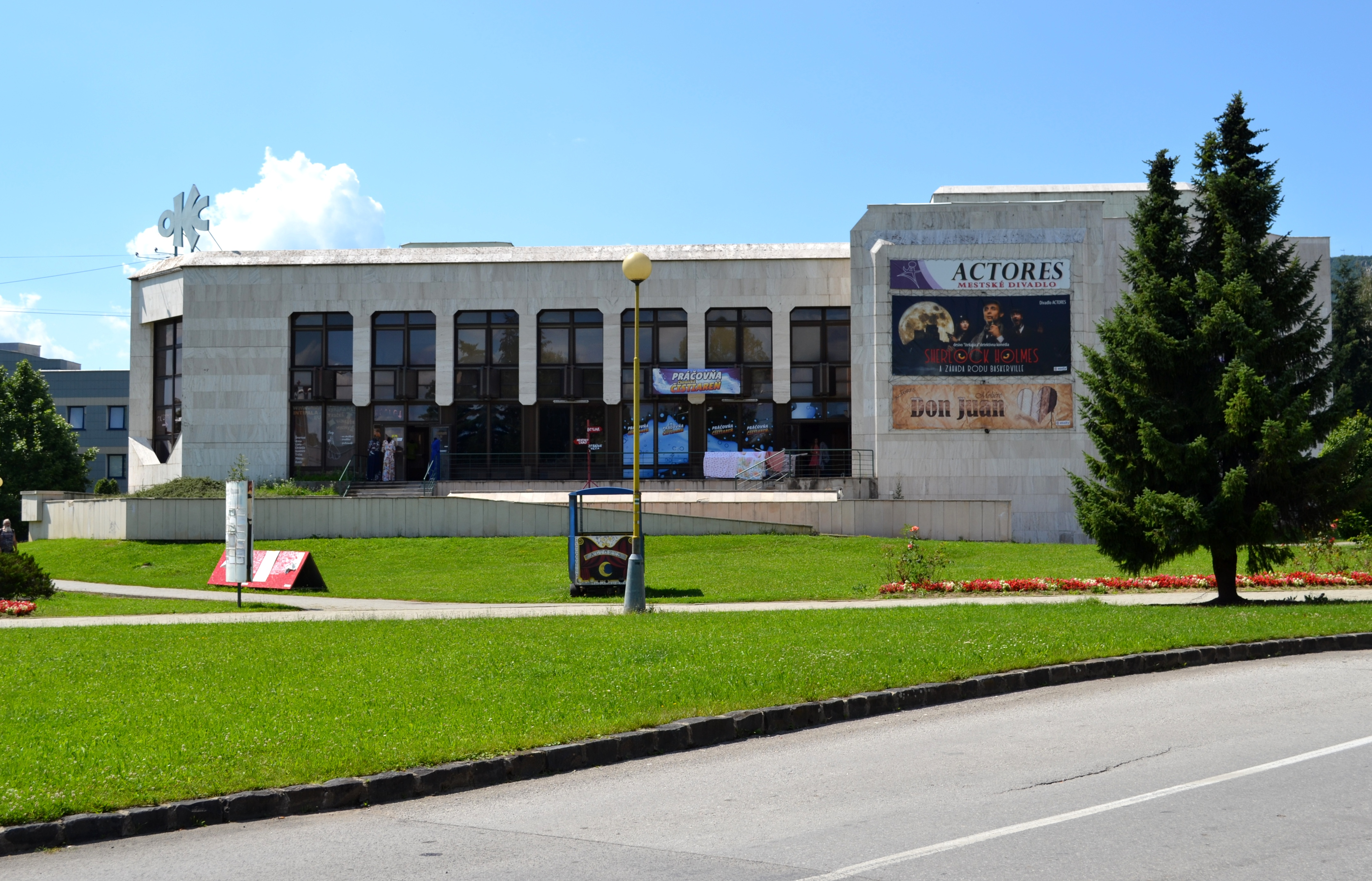 Profesionálne Mestské divadlo ACTORES v Rožňave